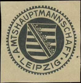 Sealing stamp Title: Amtshauptmannschaft Leipzig Description: Briefsiegel, schwarz, weiß Place: Leipzig size: 4x4 cm